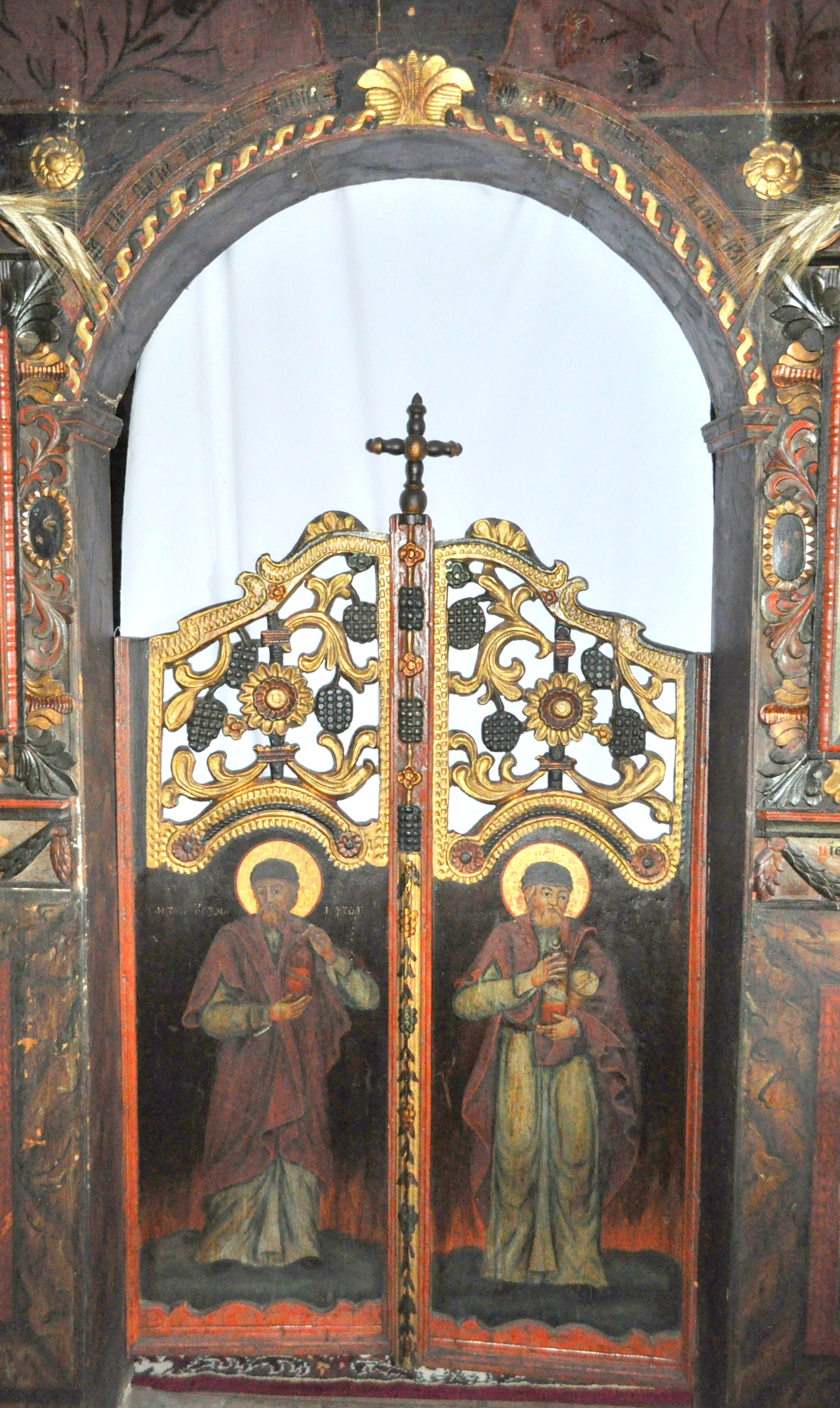 Biserica „Sf. Arhangheli Mihail și Gavriil” din Răstoci”, județul Sălaj